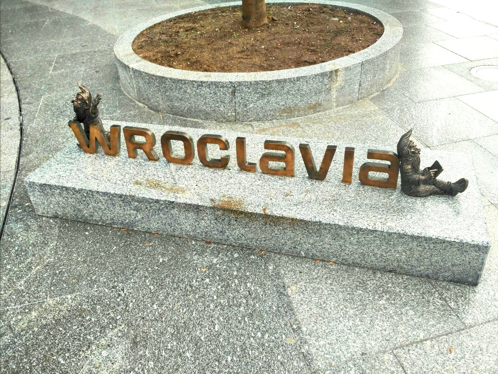 Wrocław, krasnale przy wejściu do centrum handlowo-rozrywkowo-biurowego ( Wroclavia) od strony ul. Dyrekcyjnej i Borowskiej(MW) autorstwa Beaty Zwolańskiej-Hołod